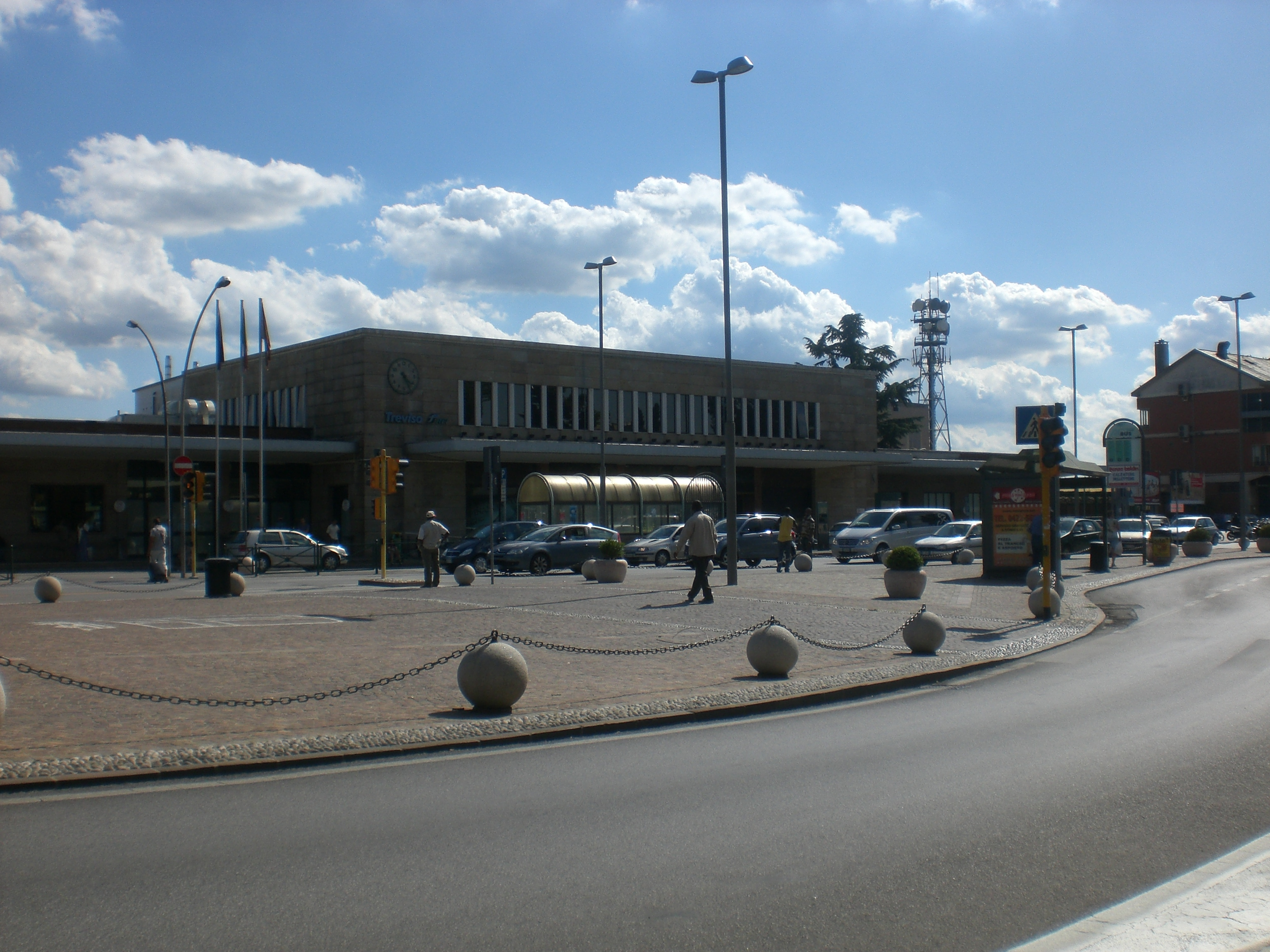 Treviso FS